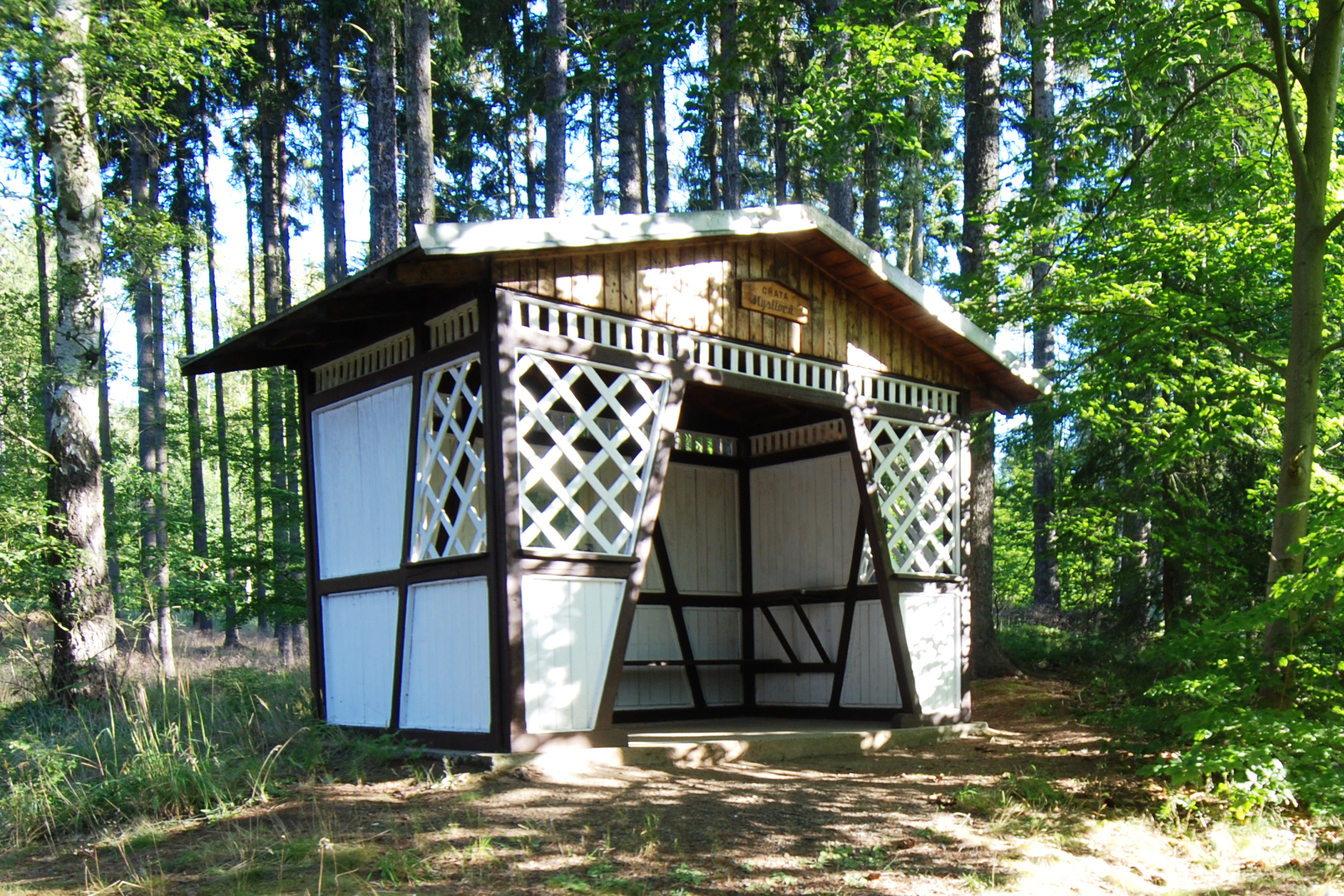 Chata Myslivců v karlovarských lázeňských lesích u Jungmannovy cesty